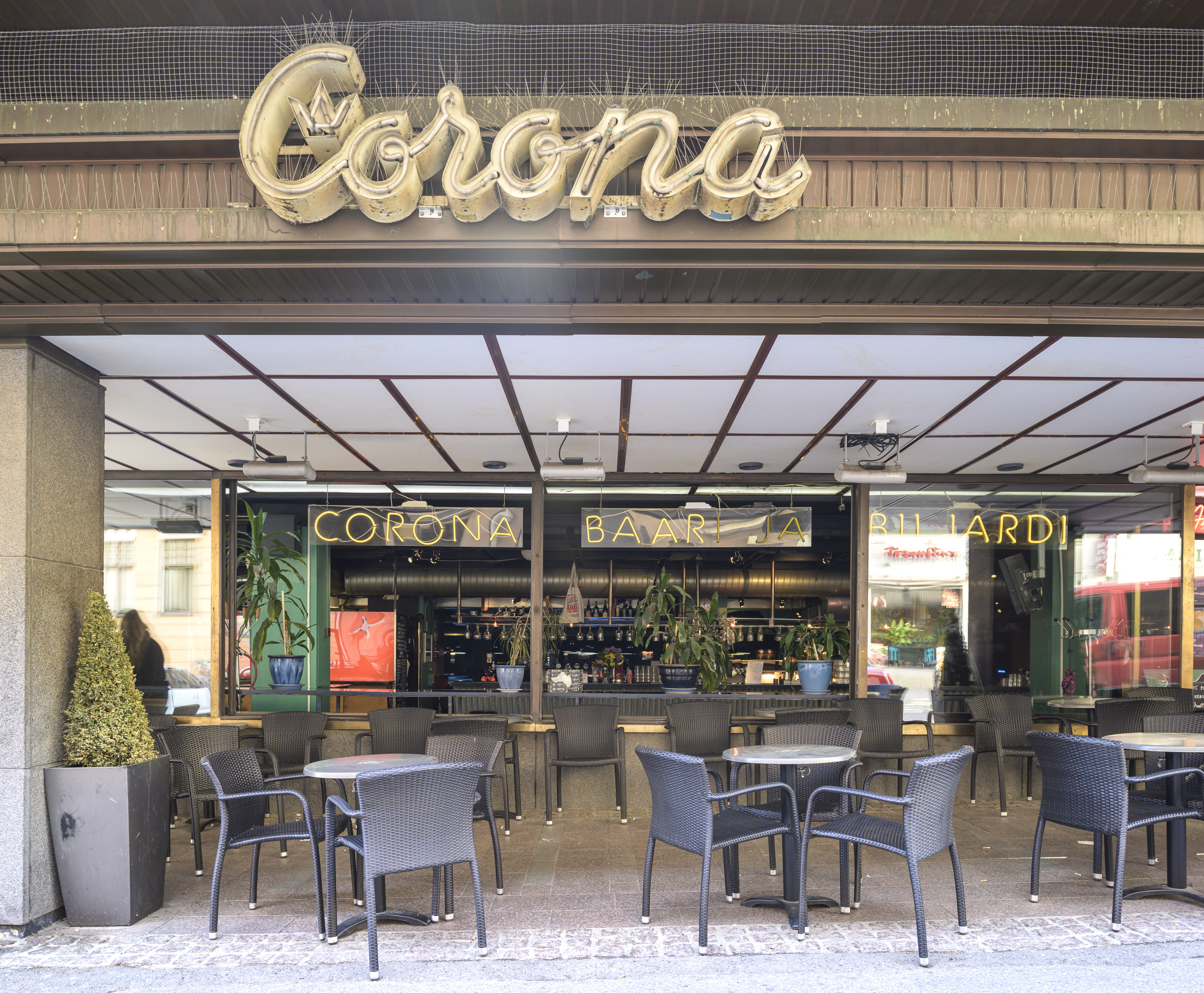 20190530 . Eerikinkatu 11. Rakennusmestarien talossa kesäkuuhun 2019 sijainneet elokuvateatteri Andorra, Corona baari biljardi, Dubrovnik lounge lobby ja Kafe Moskova. Ensimmäisessä kerroksessa sijainneen Corona baari biljardin sisäänkäynti ja terassialue.